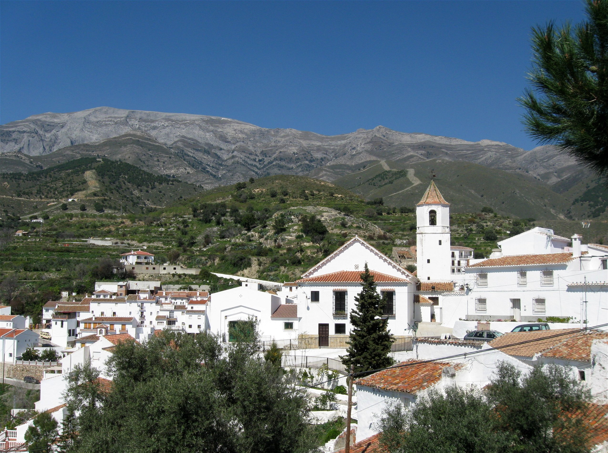 Sedella, Málaga